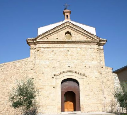 Facciata dell Chiesa S. Giovanni Battista - Calciano (Matera)